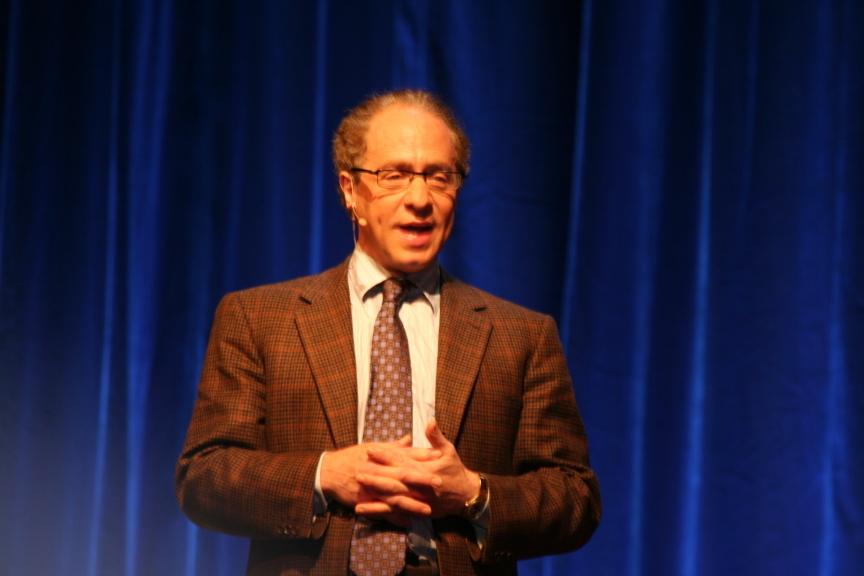 Ray Kurzweil